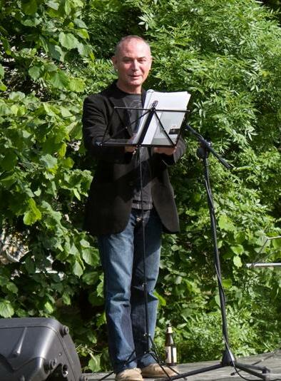 Xuan Bello en Loiola (País Vascu)